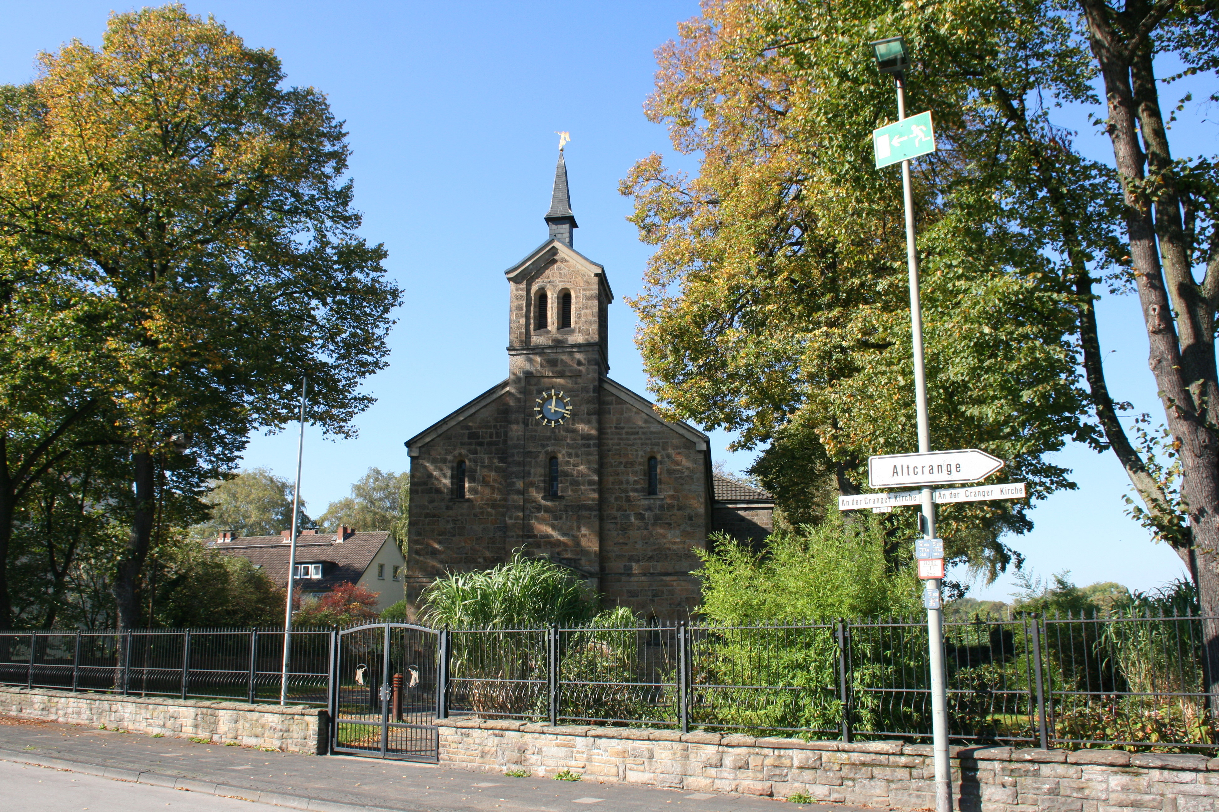 Cranger Kirche, An der Cranger Kirche in Herne-Crange